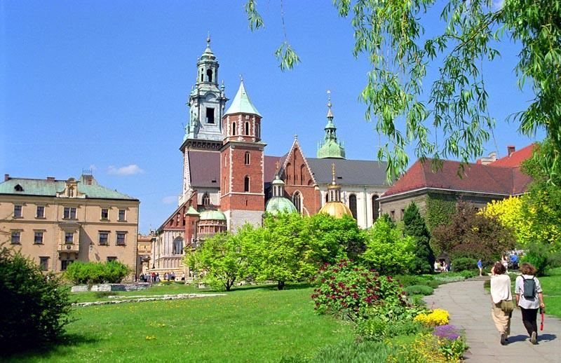 Krakow (Poland) Wawel